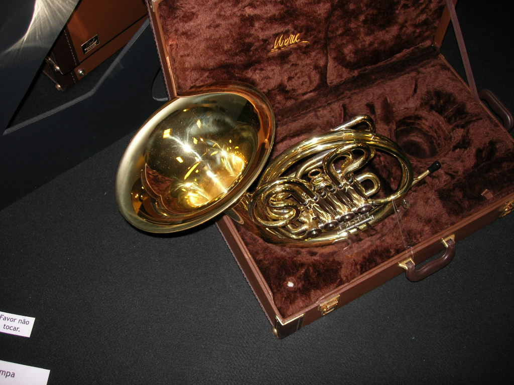 Trompa em exposição, tirada por mim.